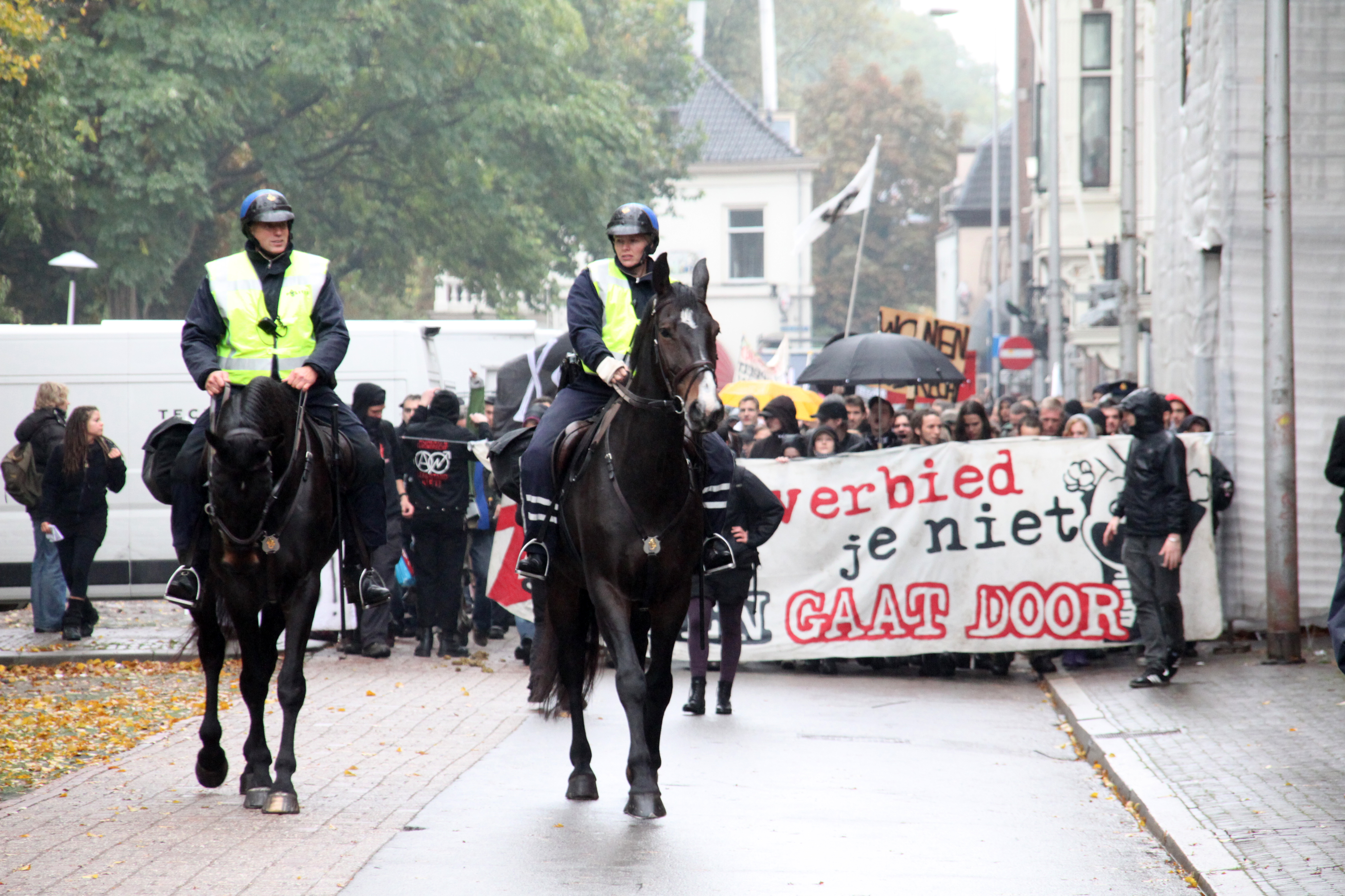 Bereden Politie voorop een optocht door Utrecht tegen het kraakverbod.